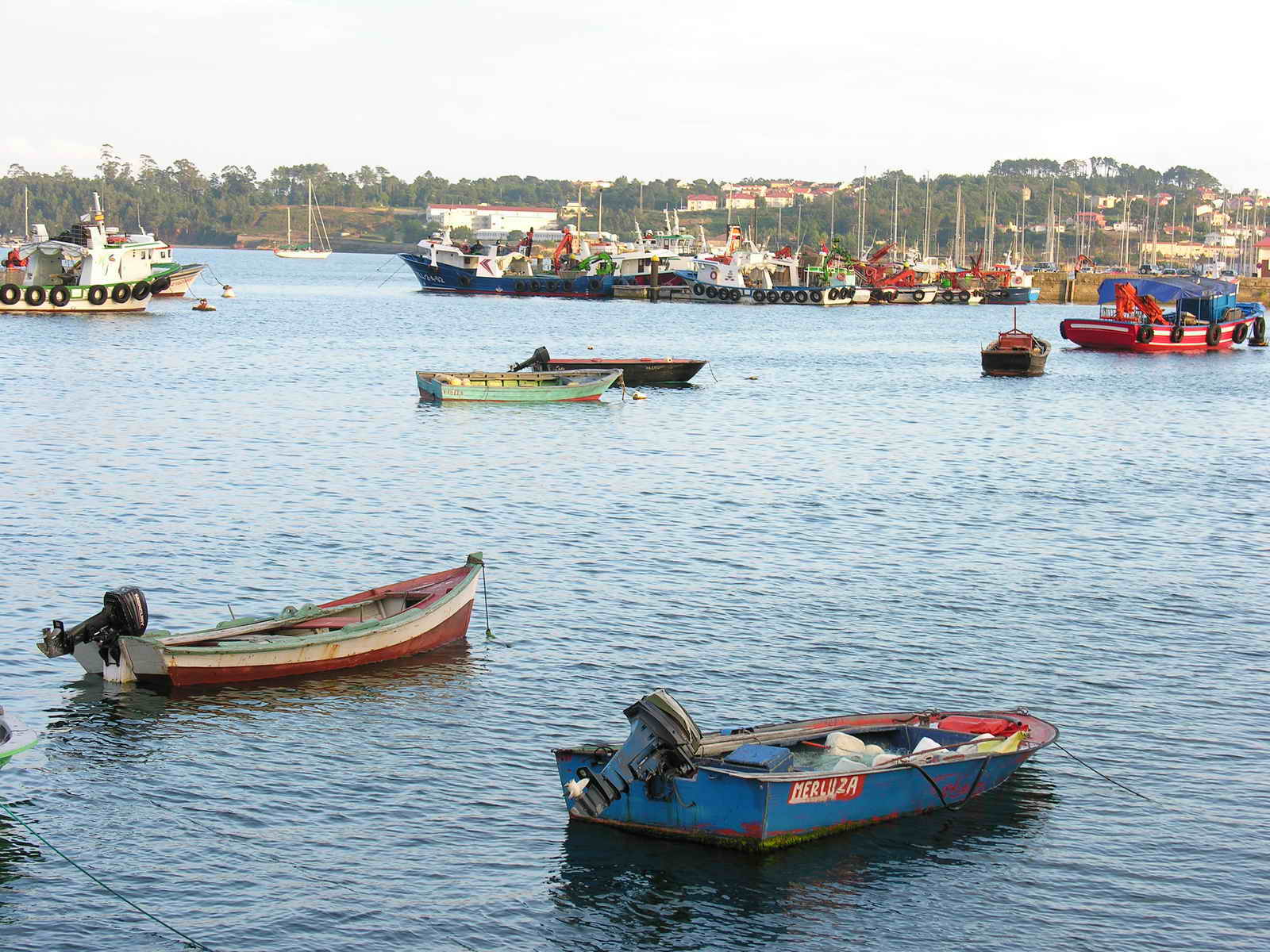 Pobra - Galicia - Spain